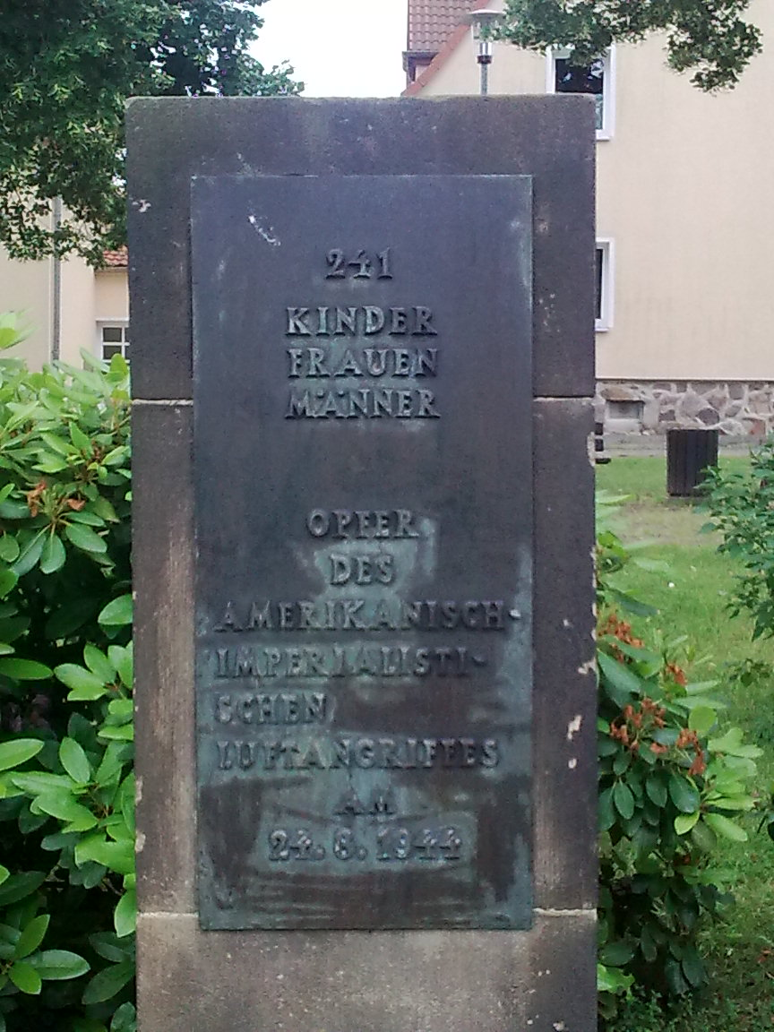 Denkmal an der Blumenstraße in Freital-Birkigt